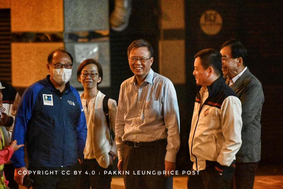 滕錦光陪同未成年學生同警察處登記後，與一眾管理層視察